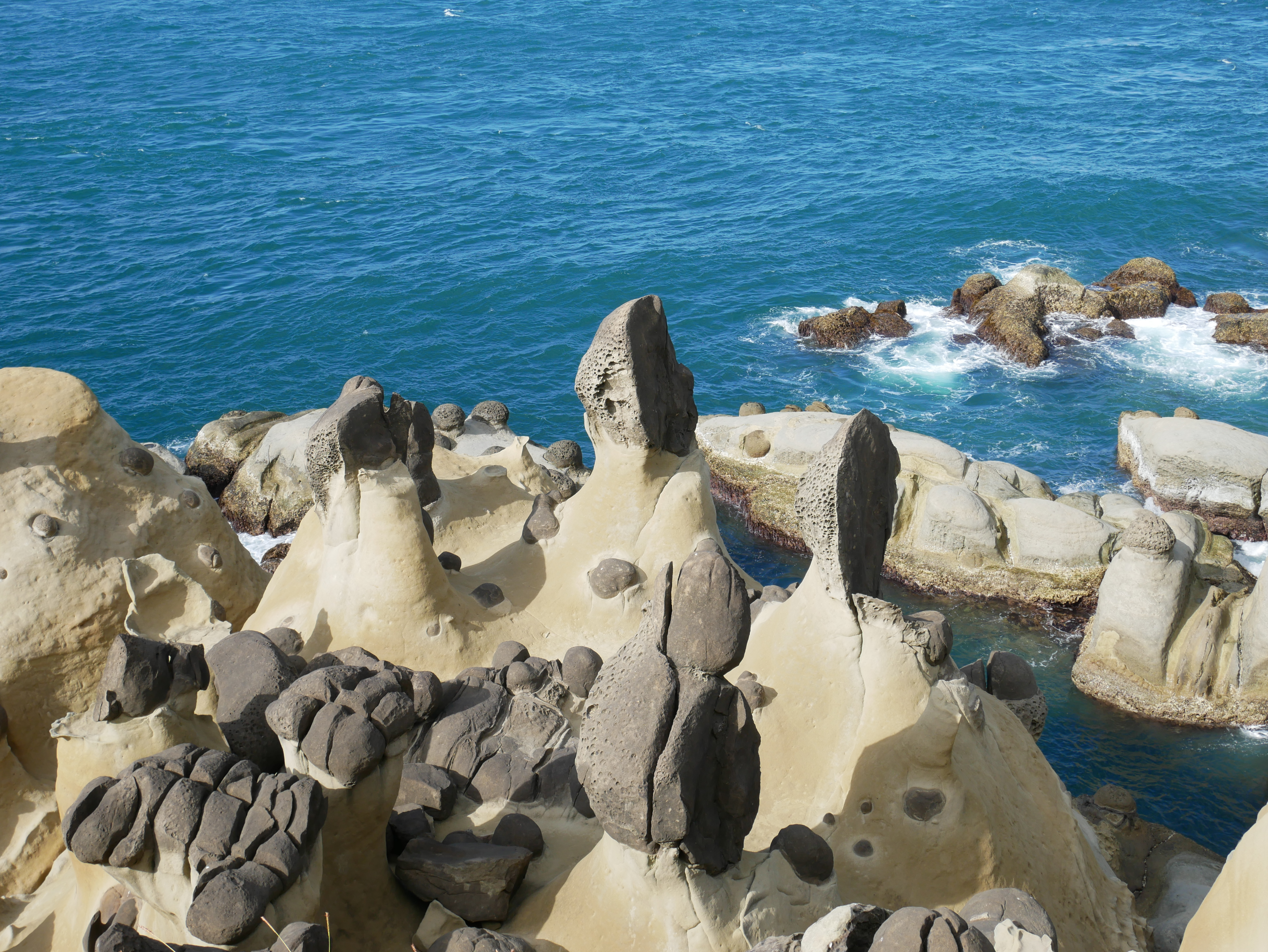 中文（台灣）: 和平島公園海兔岩，基隆市中正區平寮里